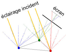 Principe de la chambre noire : les rayons incidents sont diffusés dans toutes les directions par chaque point de l'objet observé ; par le trou de la chambre noire passent des rayons provenant de tous les points. Auteur : Christophe Dang Ngoc Chan (Cdang), réalisé avec un programme de dessin vectoriel.